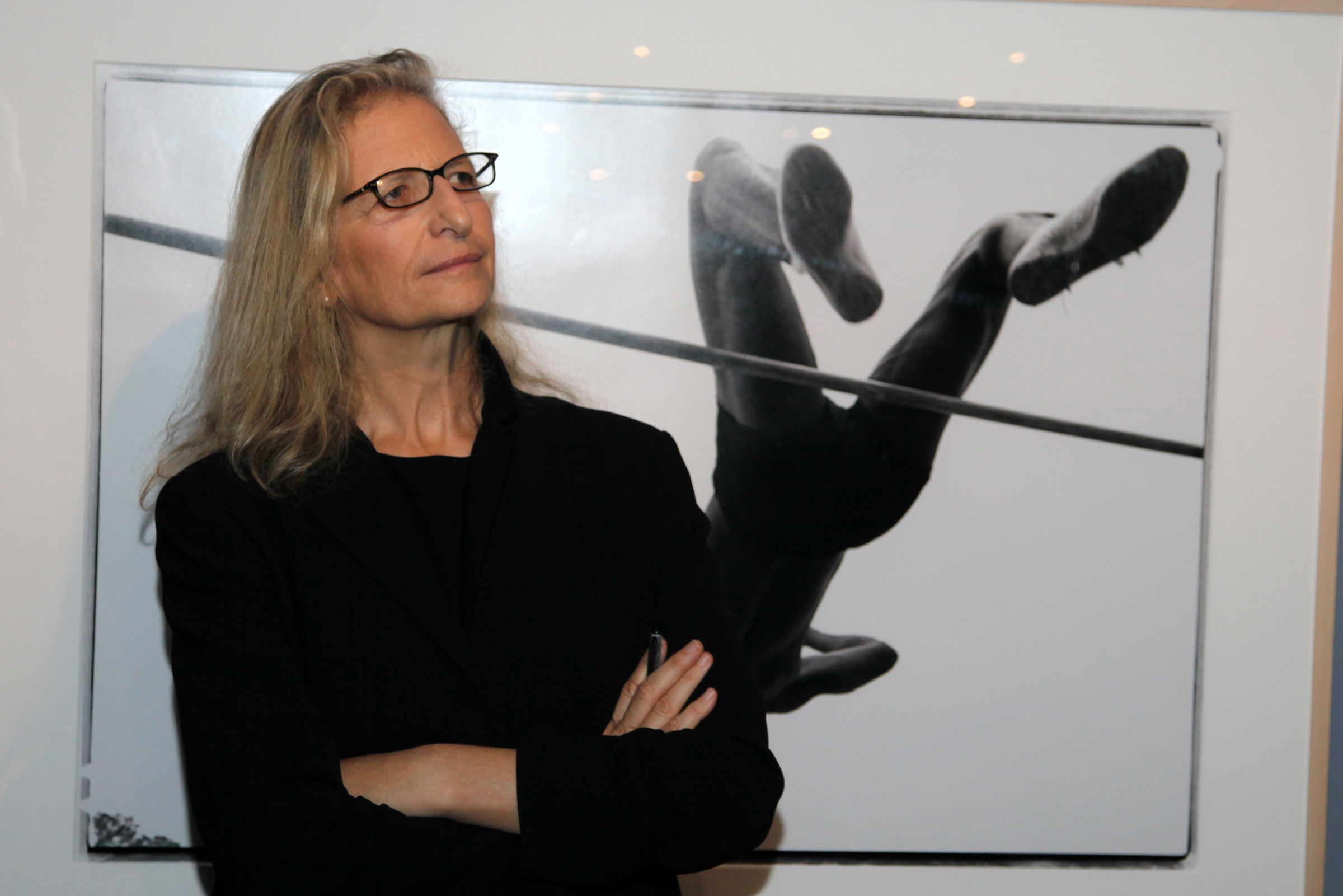 Leibovitz_Annie-091030-6841